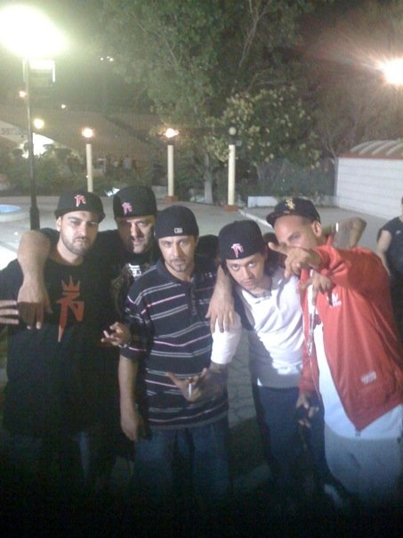 ZN recording Taki Tsan's new Solo Album "Rima gia Xrima 2009"